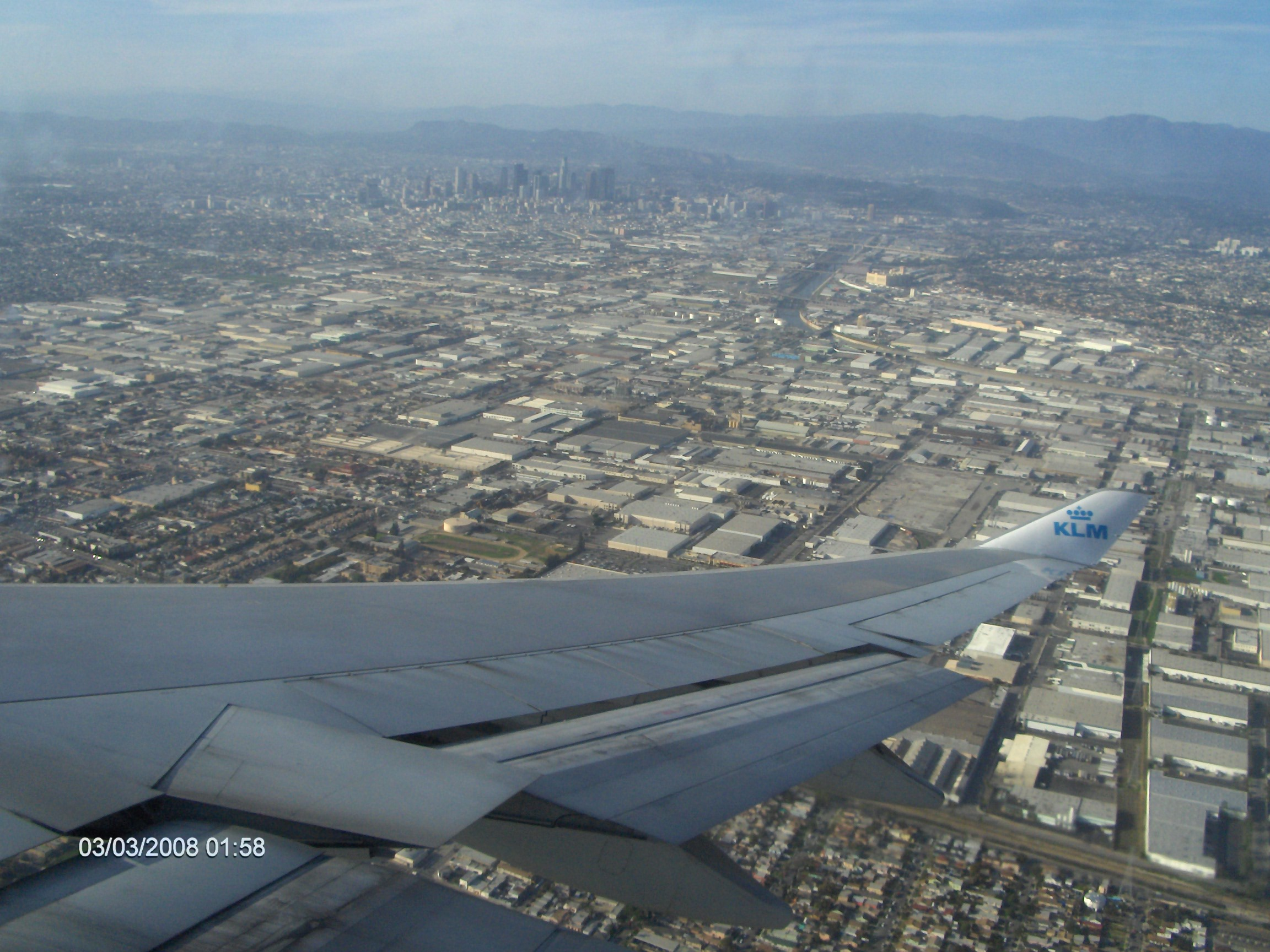 Los Angeles gezien vanuit een Boeing 747